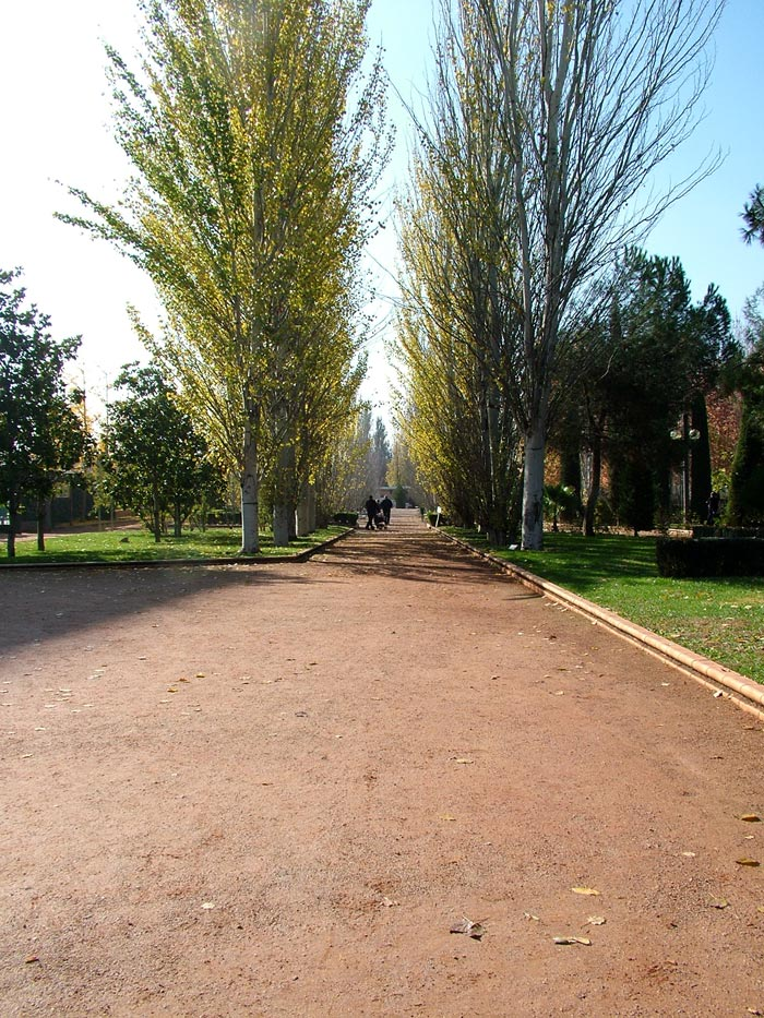 Parque Federico García Lorca, en Granada (España)